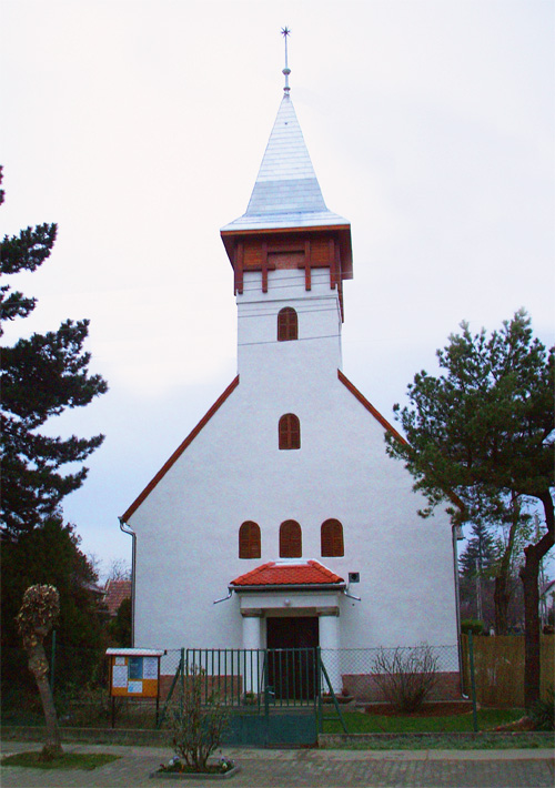 Kistarcsai református templom